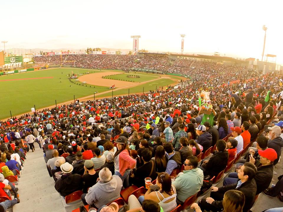 Vista interna del estadio Gasmart.